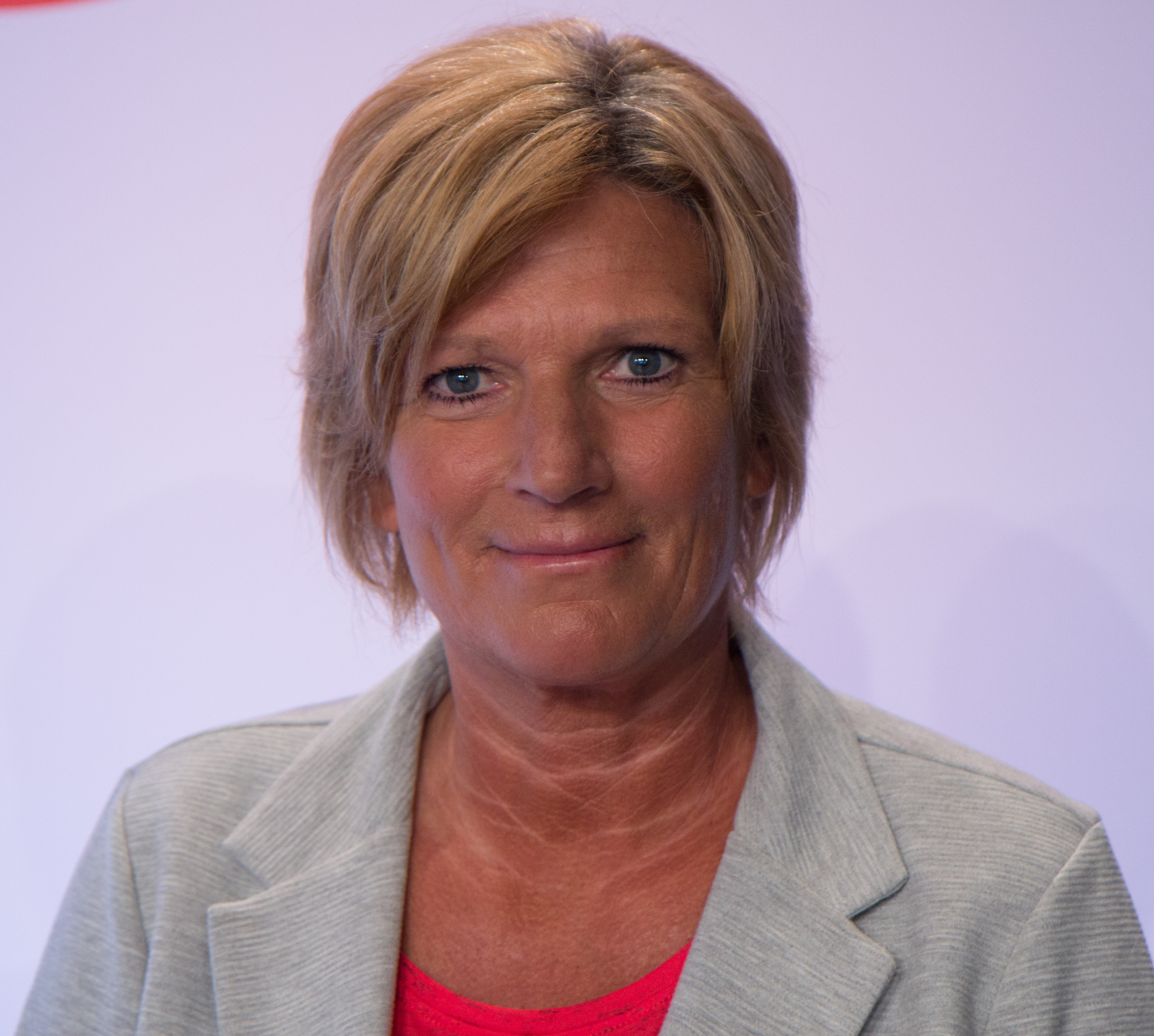 FIFA WM 2018 Pressevorstellung von ARD und ZDF in Hamburg: Claudia Neumann